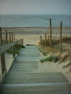 Acces à la plage des Sables d'Or à La Guérinière Vue sur la dune, la plage et les bouchots Auteur de la photo: Vendenesse